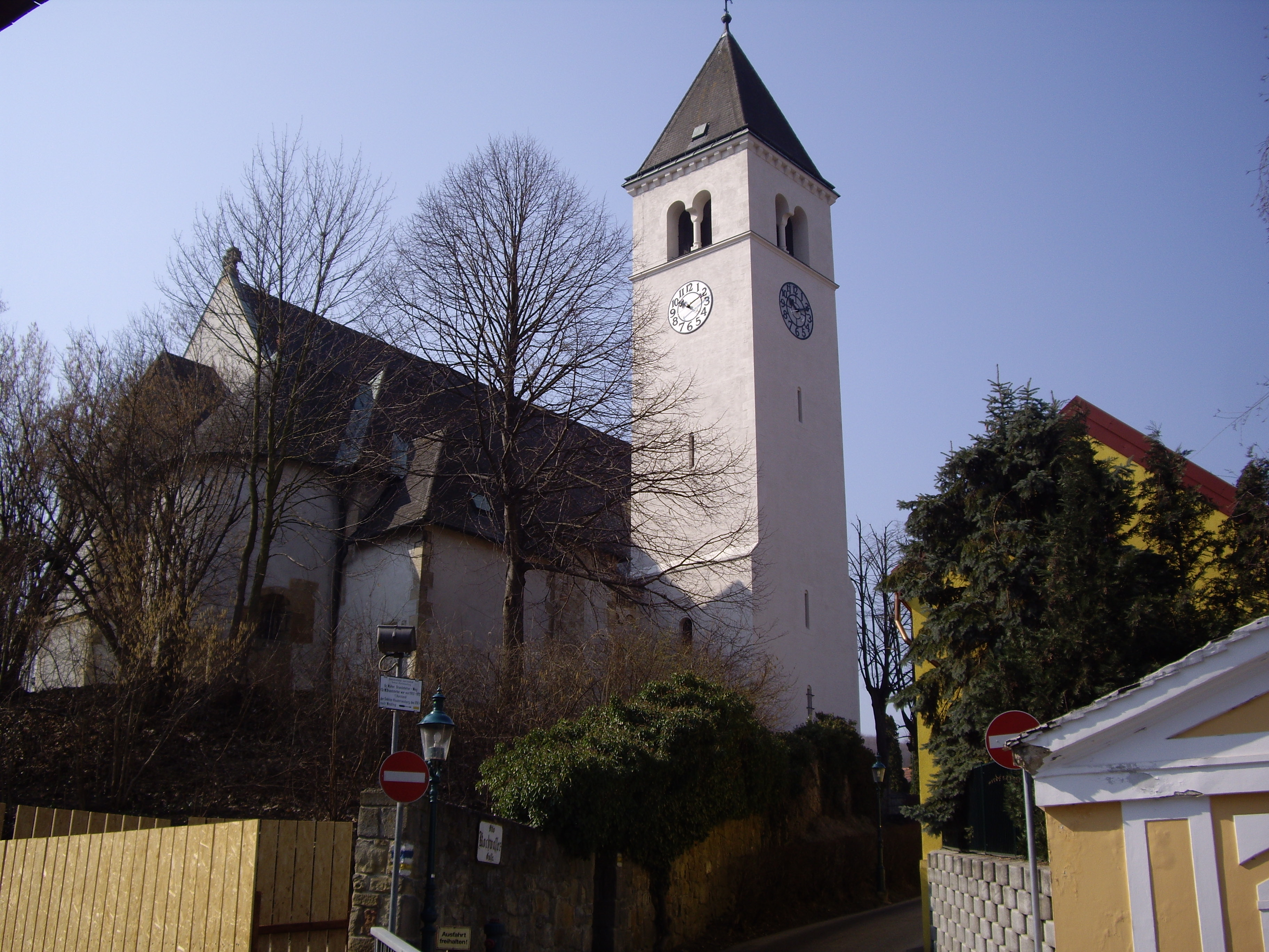 Katolika parohha preghejo St-a Petro kaj Paulo en Kierling